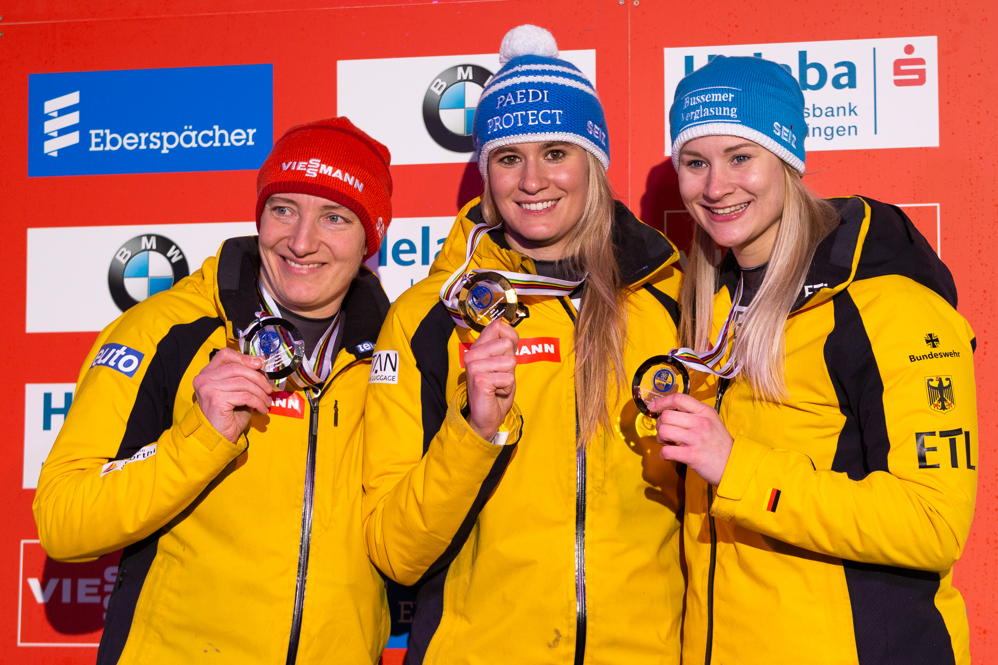 Viessmann Luge World Cup Oberhof; v.li.: Tatjana Hüfner (GER, Deutschland), Natalie Geisenberger (GER, Deutschland), Dajana Eitberger (GER, Deutschland); Flower Ceremony, Blumenzeremonie, Siegerehrung